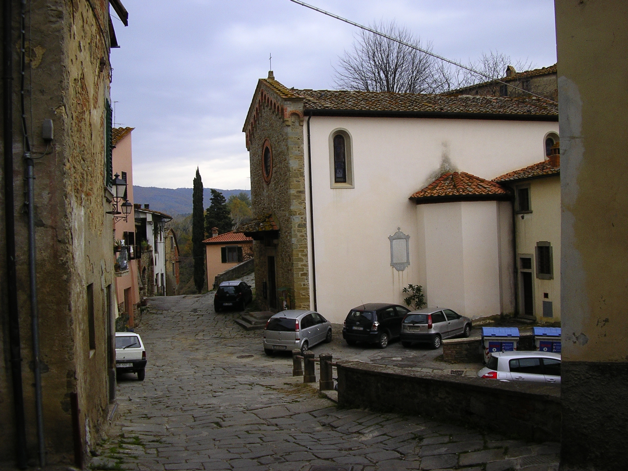 campogialli_borgo